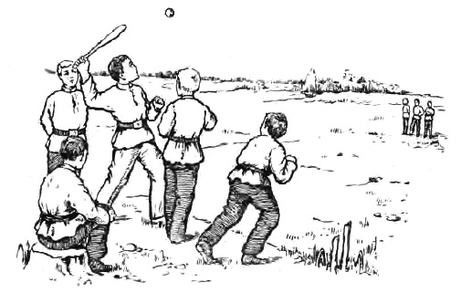 Игра в лапту. Рисунок из книги Волков М. Лапта. Правила игры — СПб.: Товарищество М. О. Вольф, 1915г, изд Вольф — 16 с.